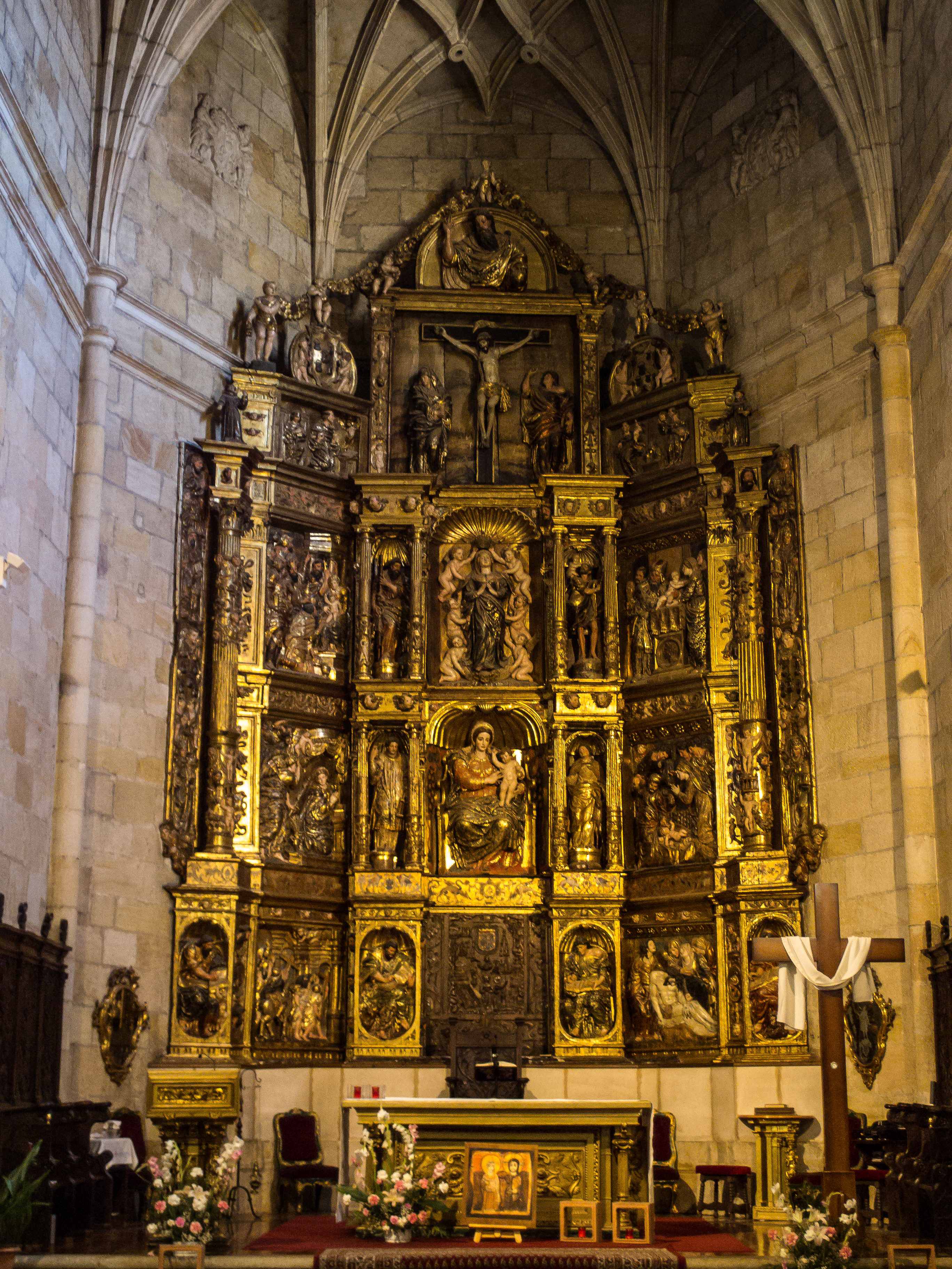 Retablo mayor renacentista de la Iglesia de Santa María la Mayor, Soria, Castilla y León, España